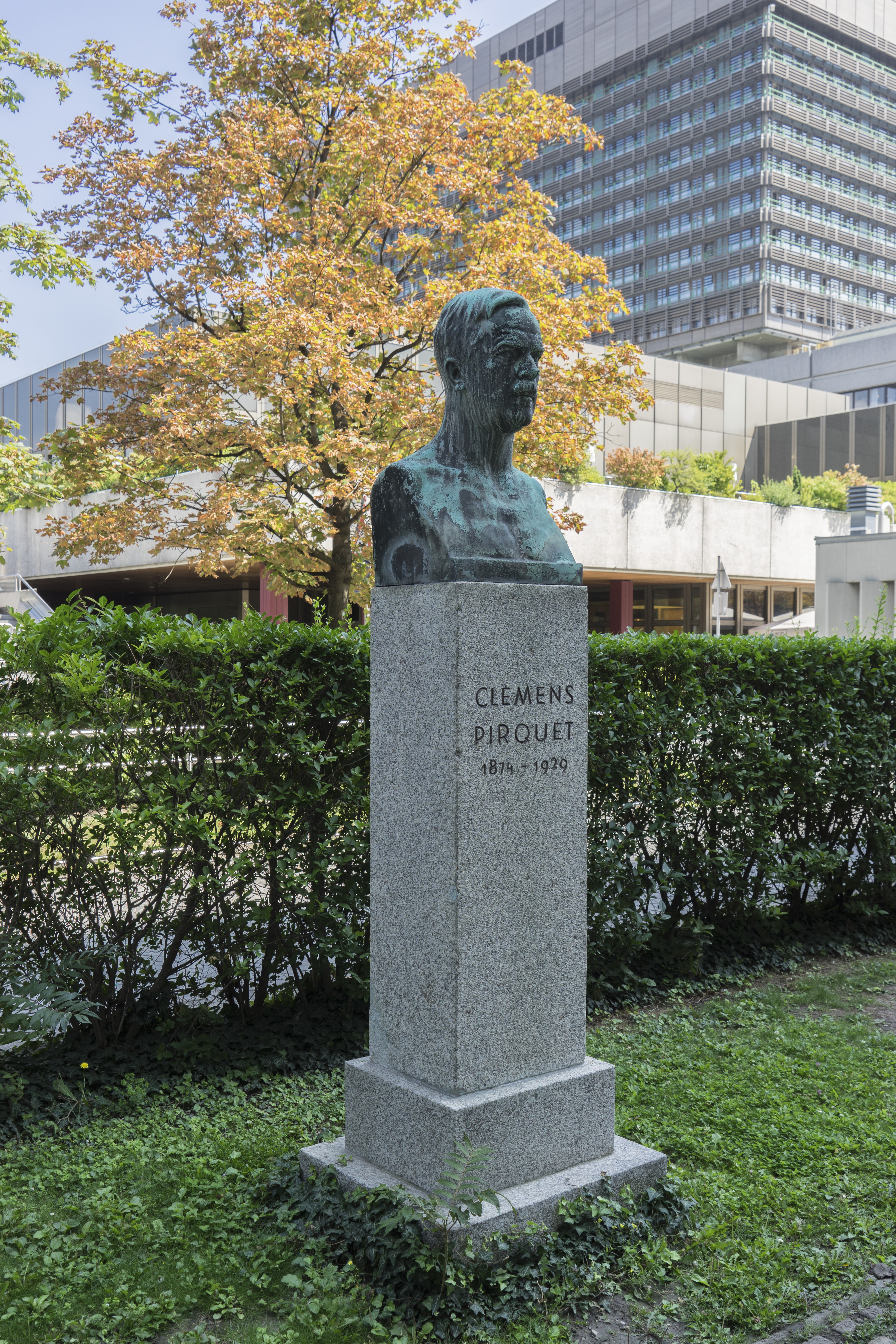 Clemens Pirquet Denkmal, AKH. In Gürtelnähe vor dem Kinderkrankenhaus.